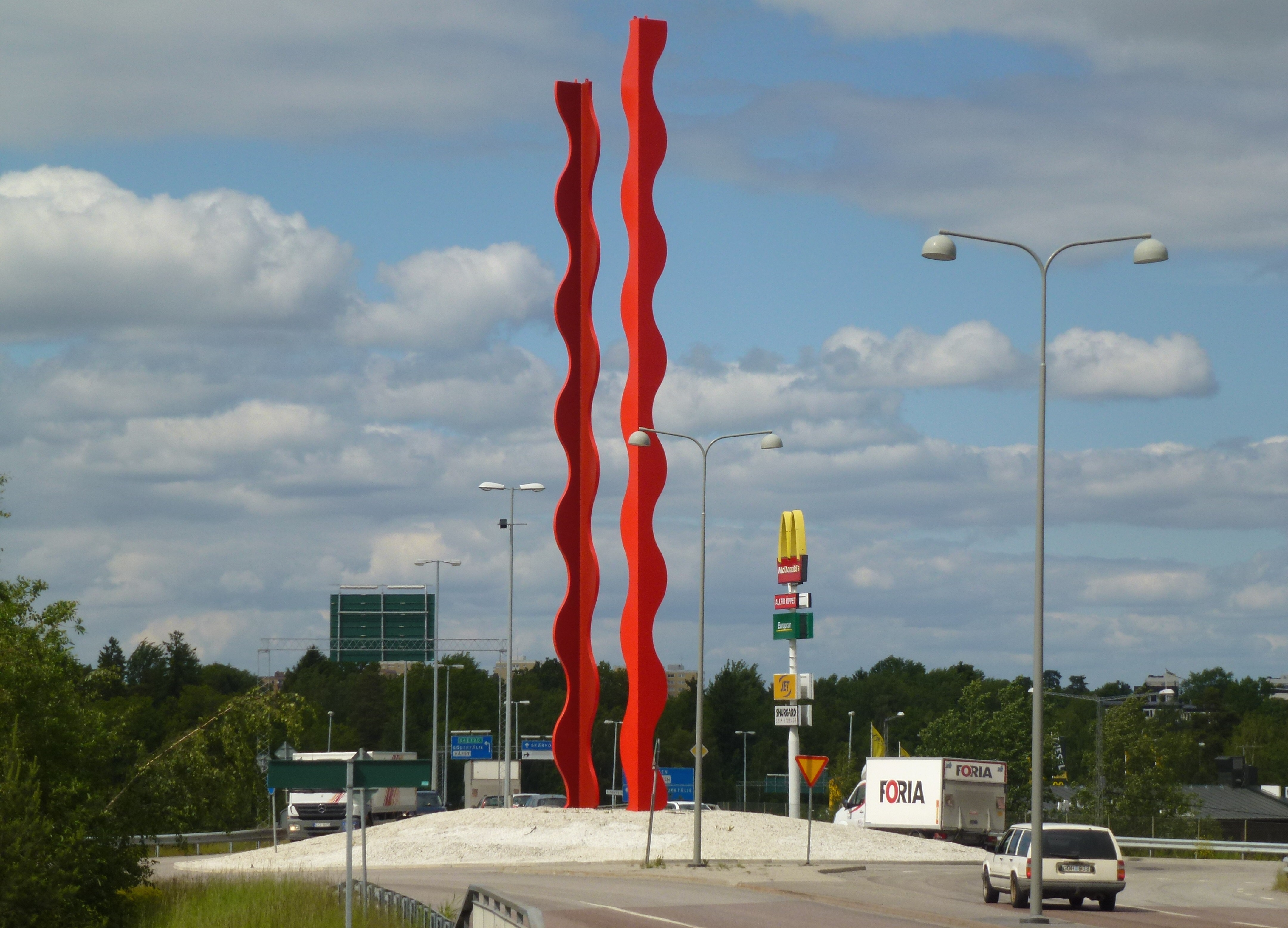 Mats Olofgörs skulptur "Vågat möte" trafikplats Lindvreten, Kungens Kurva